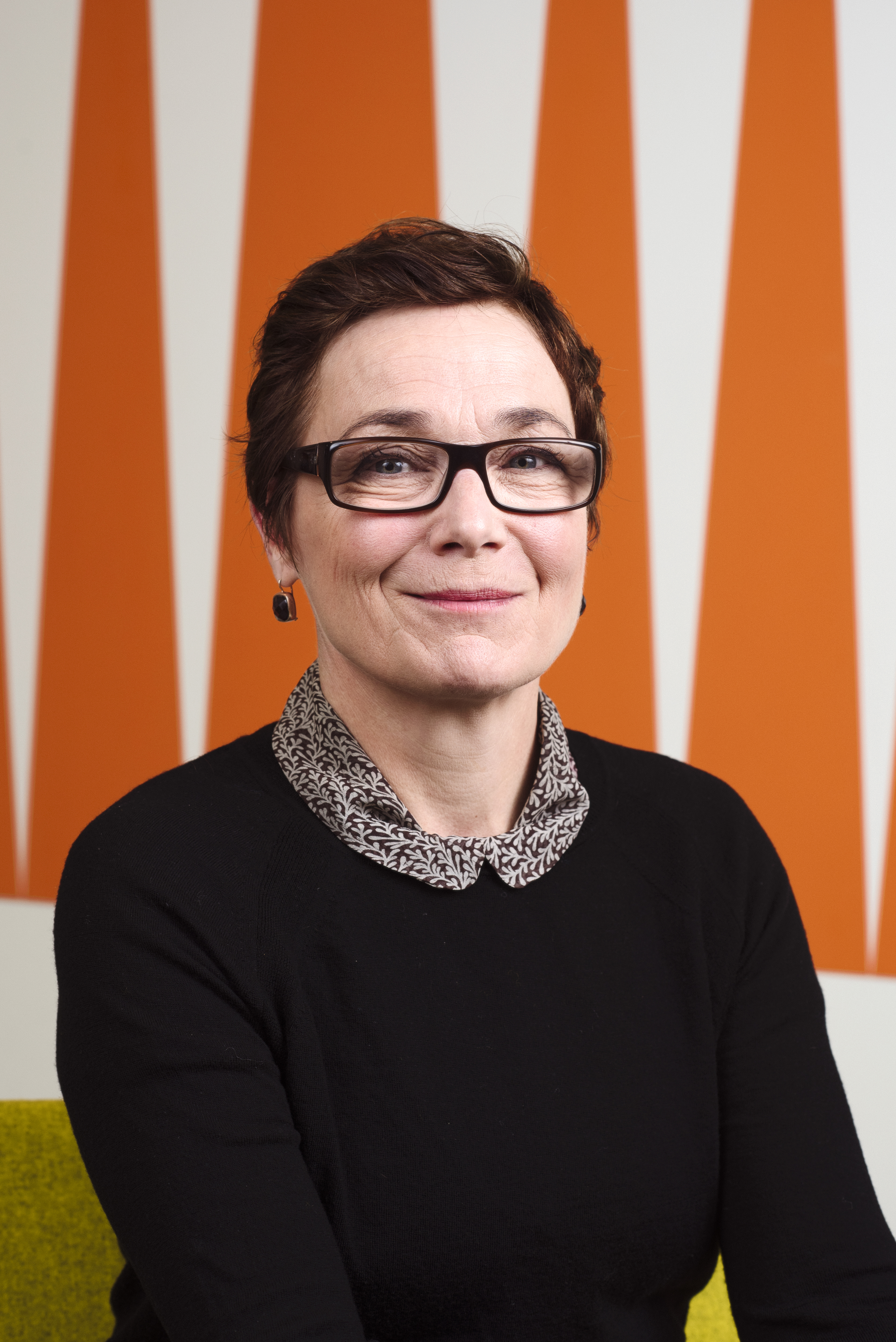 Anne-Marie Körling, född 7 februari 1958, är en svensk lärare och författare av i huvudsak pedagogiska böcker.